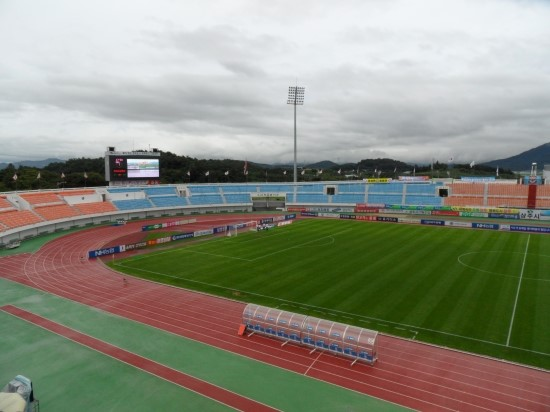 상주시민운동장